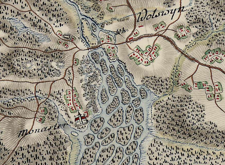 klastor bug rzeka